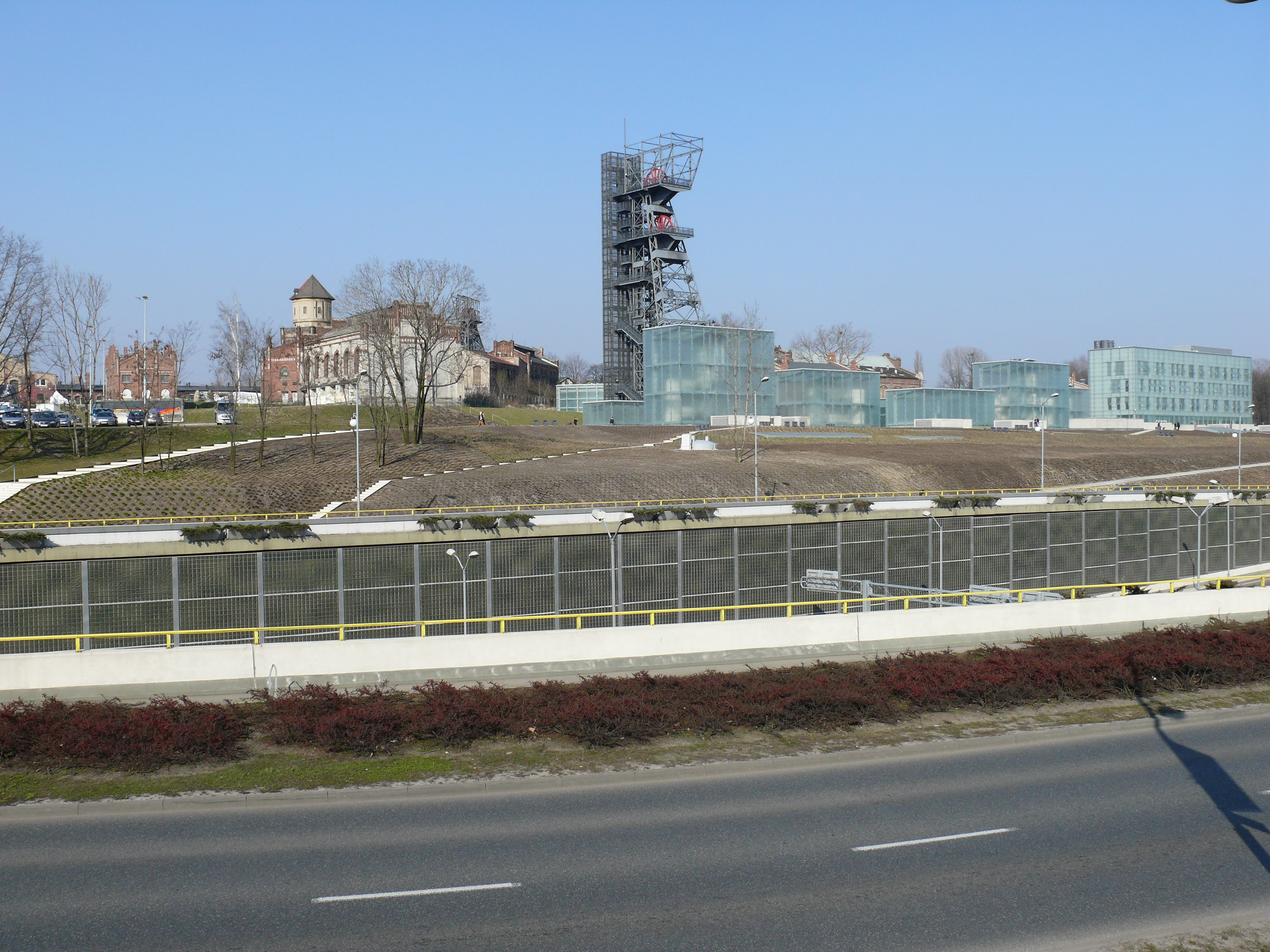 Das Schlesische Museum in Kattowitz an seinem neuen Standort.